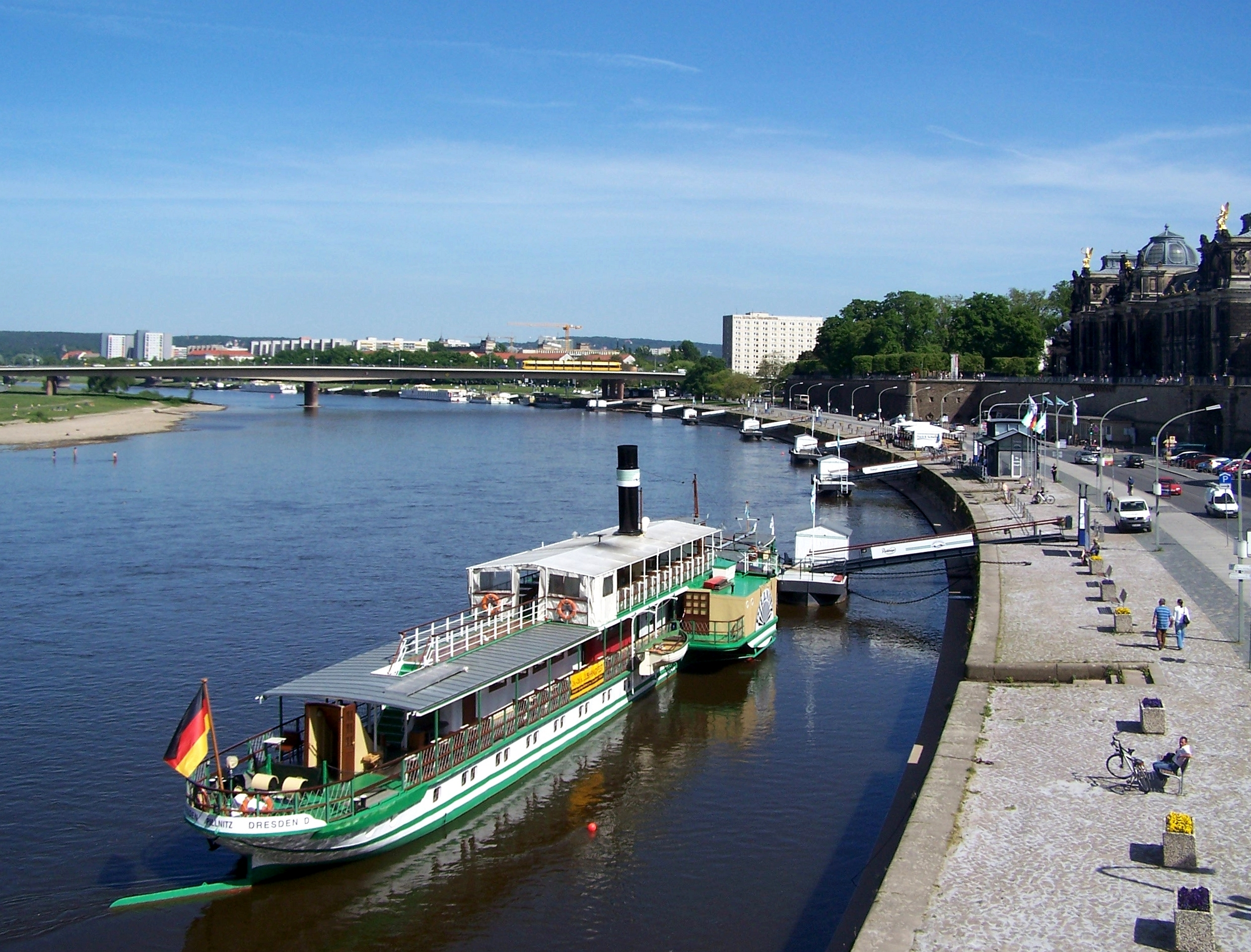 Anlegestelle der Weißen Flotte am Terrassenufer